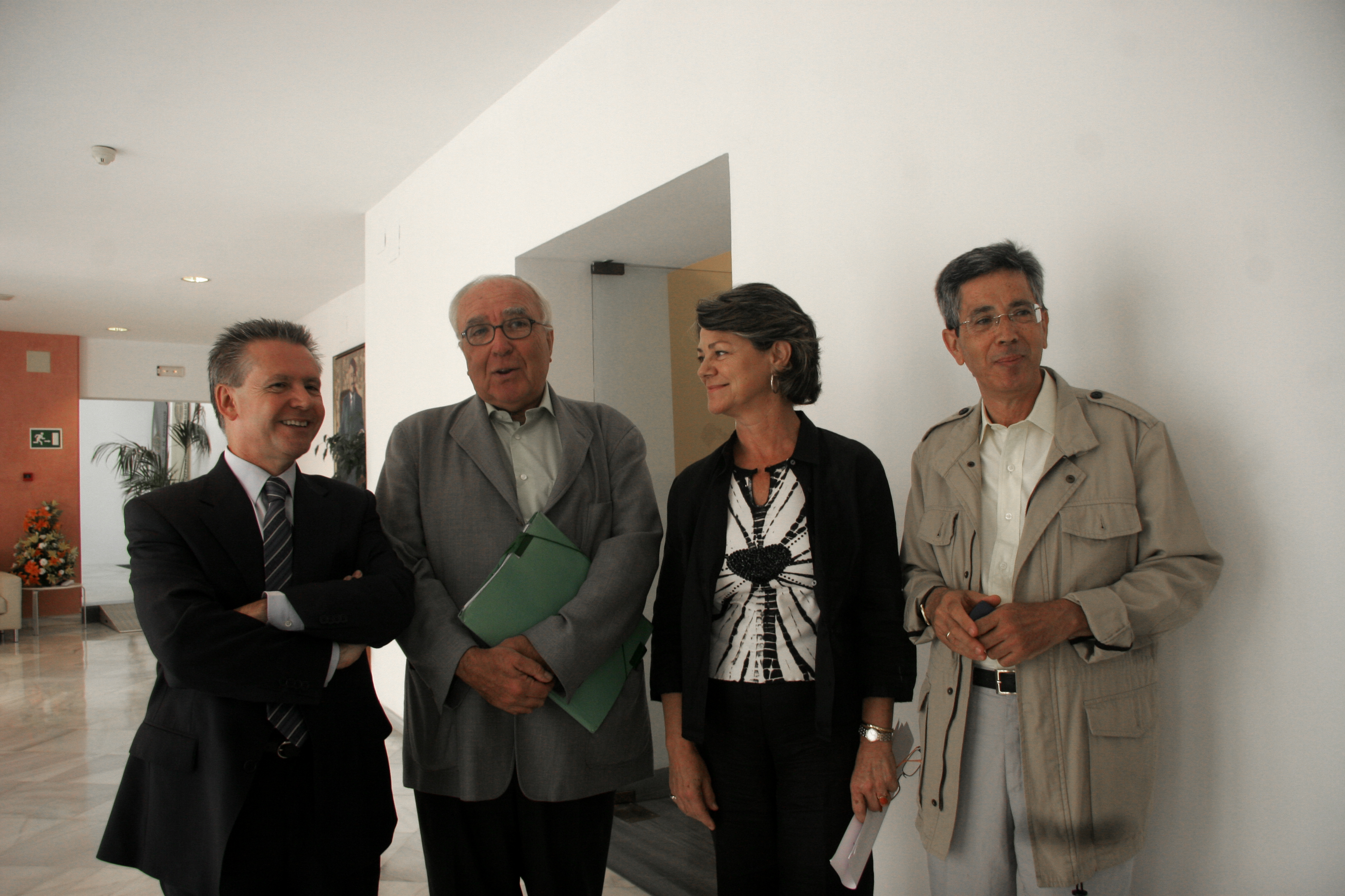 De izquierda a derecha: Manuel Ángel Vázquez Medel, Román Gubern, María García-Doncel y Rafael Utrera Macías. Curso "De la Literatura al Cine. Del Cine a la Literatura" (Cursos de Verano 2007 de la Universidad Internacional de Andalucía.